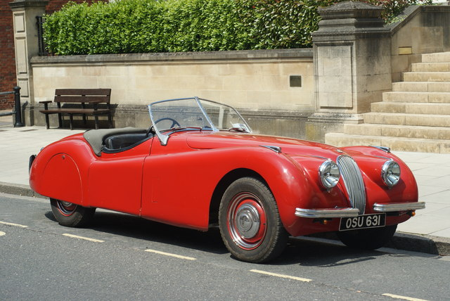 Chichester - Jaguar XK120